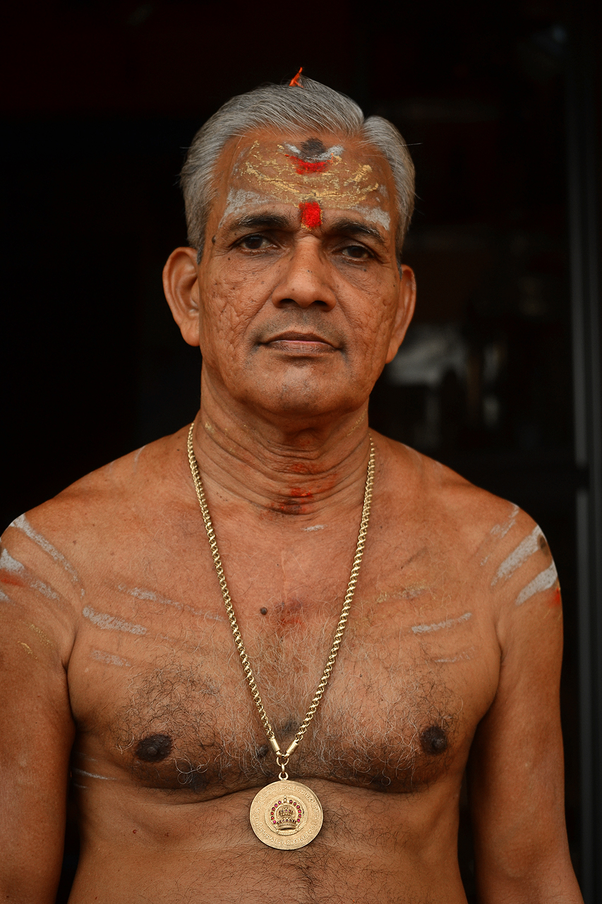 പ്രശസ്തനായ മദ്ദളകലാകരന്‍. 59വര്‍ഷംമുമ്പ് ചെര്‍പ്പുളശ്ശേരി അയ്യപ്പന്‍കാവിലെ കന്നിനിറമാലയ്ക്ക് കേളിക്കയ്യോടെ അരങ്ങേറ്റം കുറിച്ചു.33-ാം വയസ്സില്‍ കലാമണ്ഡലത്തില്‍ പഞ്ചവാദ്യം മദ്ദളം അധ്യാപകനായി. പ്രമുഖരും പ്രശസ്തരുമായ ശിഷ്യന്മാരുടെ വലിയൊരുനിര തന്നെ ഇദ്ദേഹത്തിനുണ്ട്. വിരമിച്ച ശേഷം, ഇപ്പോഴും പ്രതിഫലവും വാങ്ങാതെ ഗുരുകുലസമ്പ്രദായത്തില്‍ സ്വന്തം വസതിയില്‍ വച്ച് വിദ്യാര്‍ഥികള്‍ക്ക് ശിക്ഷണം നല്‍കിവരുന്നു.നിരവധി വിദേശ രാജ്യങ്ങളിലും കേരളത്തില്‍ അങ്ങോളമിങ്ങോളവും മദ്ദളവാദനം നടത്തിയിട്ടുണ്ട്.